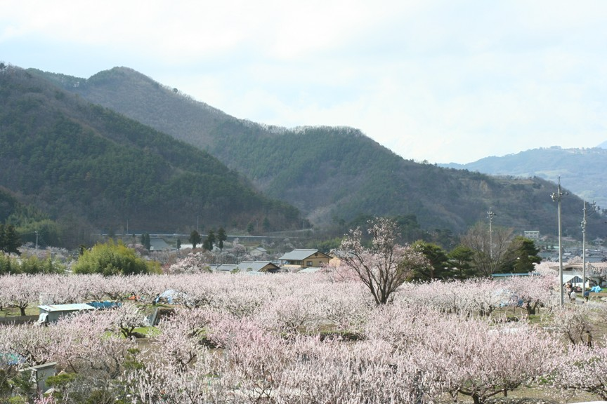 あんずの里現地で撮影